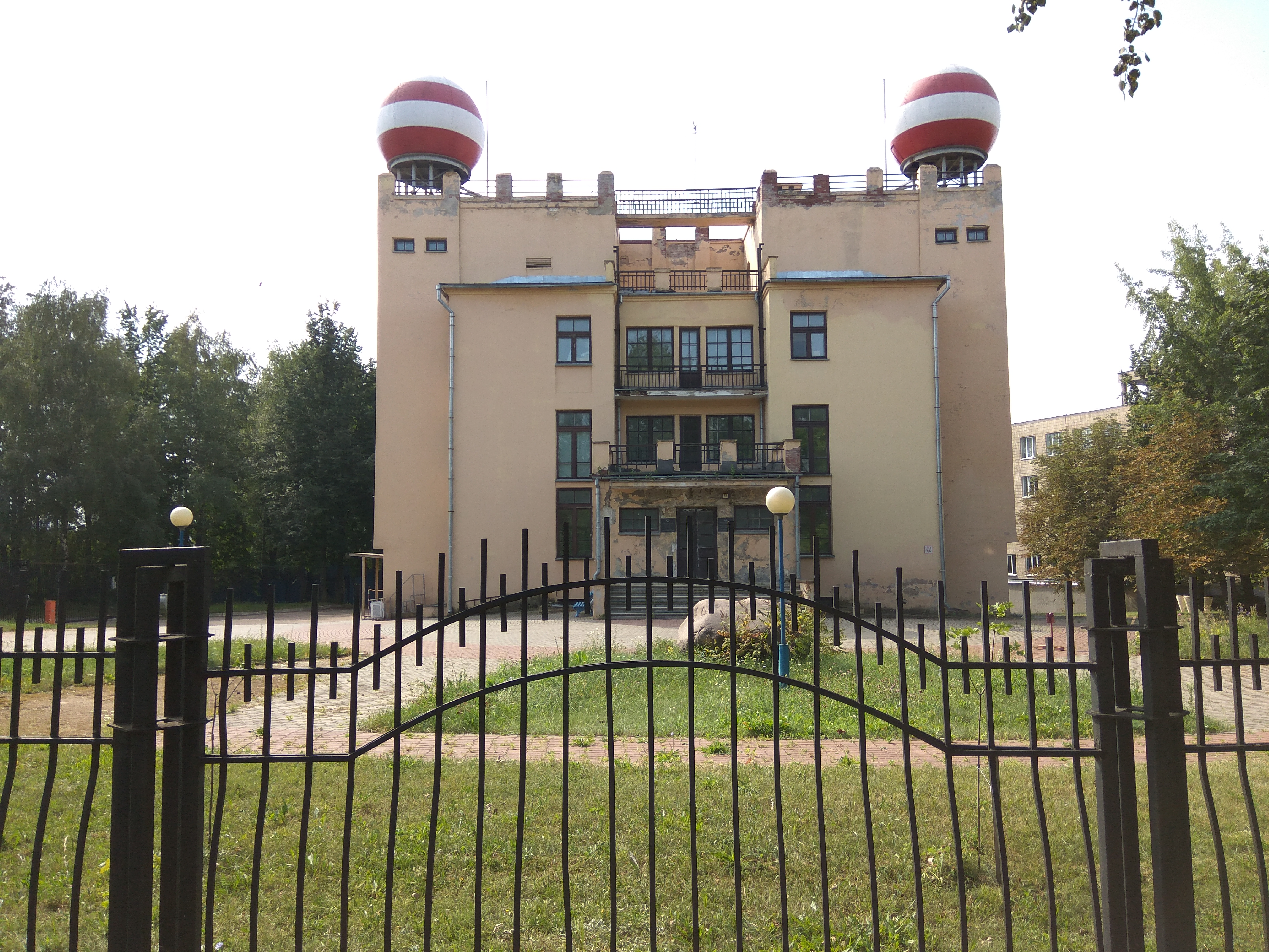 Мінск. Метэаралігічная станцыі і наваколлі